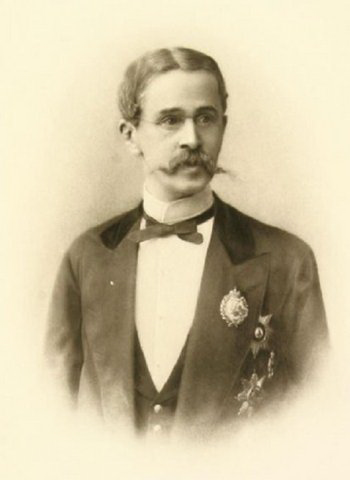 Танеев Сергей Александрович: Столетие собственной его Императорского Величества канцелярии. Строев В.Н. С.-Петербург, 1912